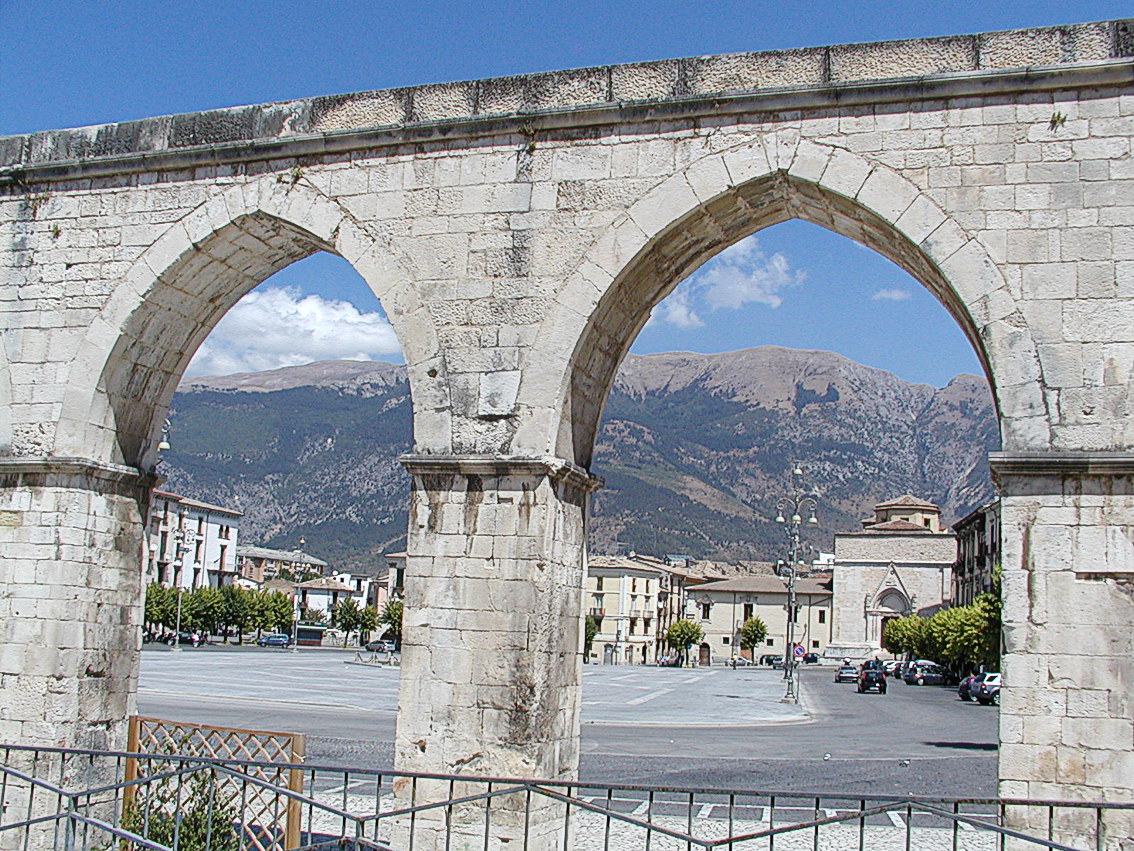 Acquedotto medievale